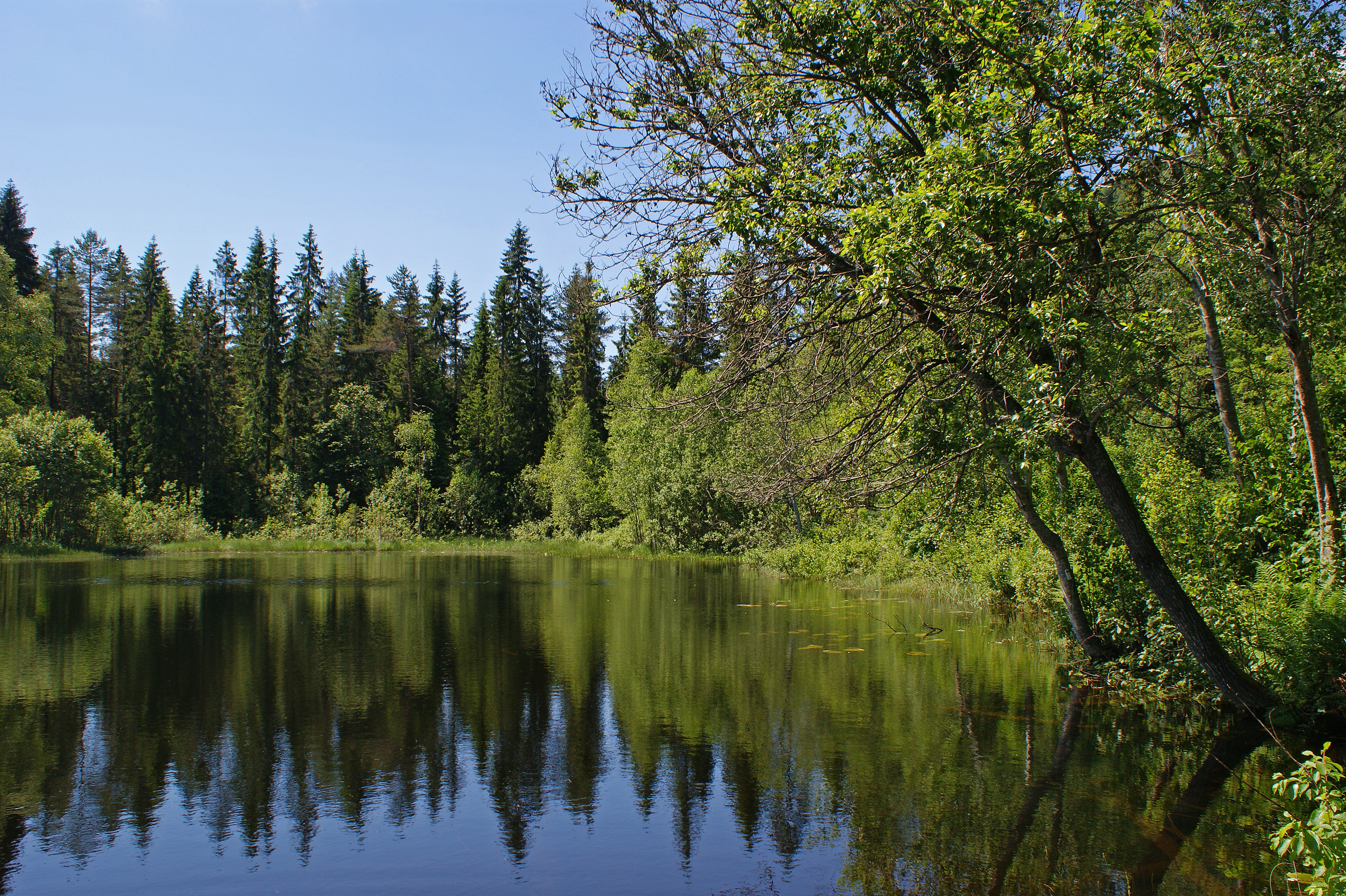 Tranevann, Asker